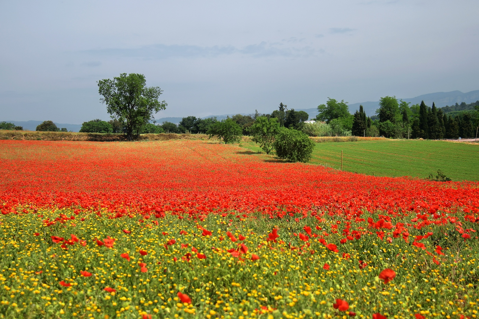 Parc de Gallecs, Mollet del Vallès, provincia de Barcelona, Cataluña, España.